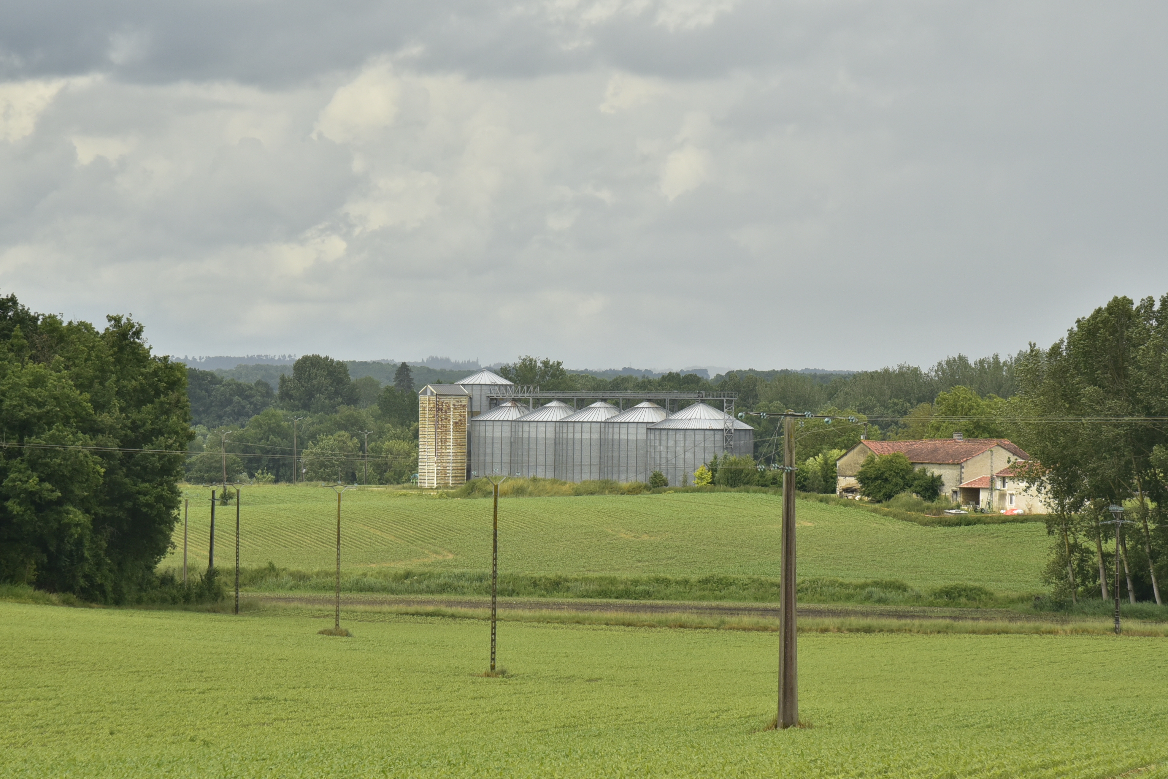 Vue du village de Champagne-et-Fontaine en Dordogne.